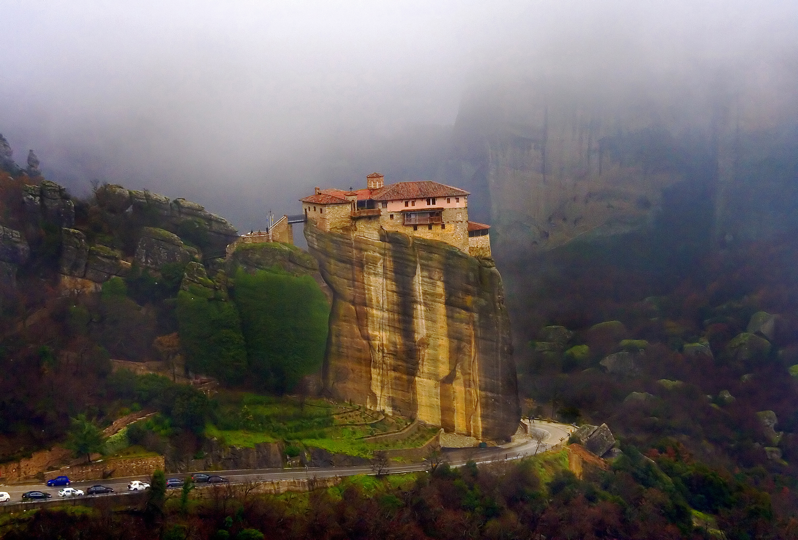 meteora1